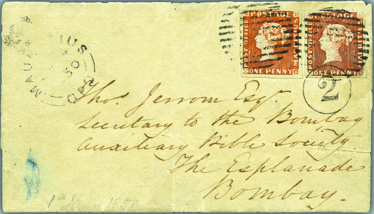 Tzv. Bombay Cover, dopis opatřený dvěma červenými mauricii (1847), odesláno 1850.